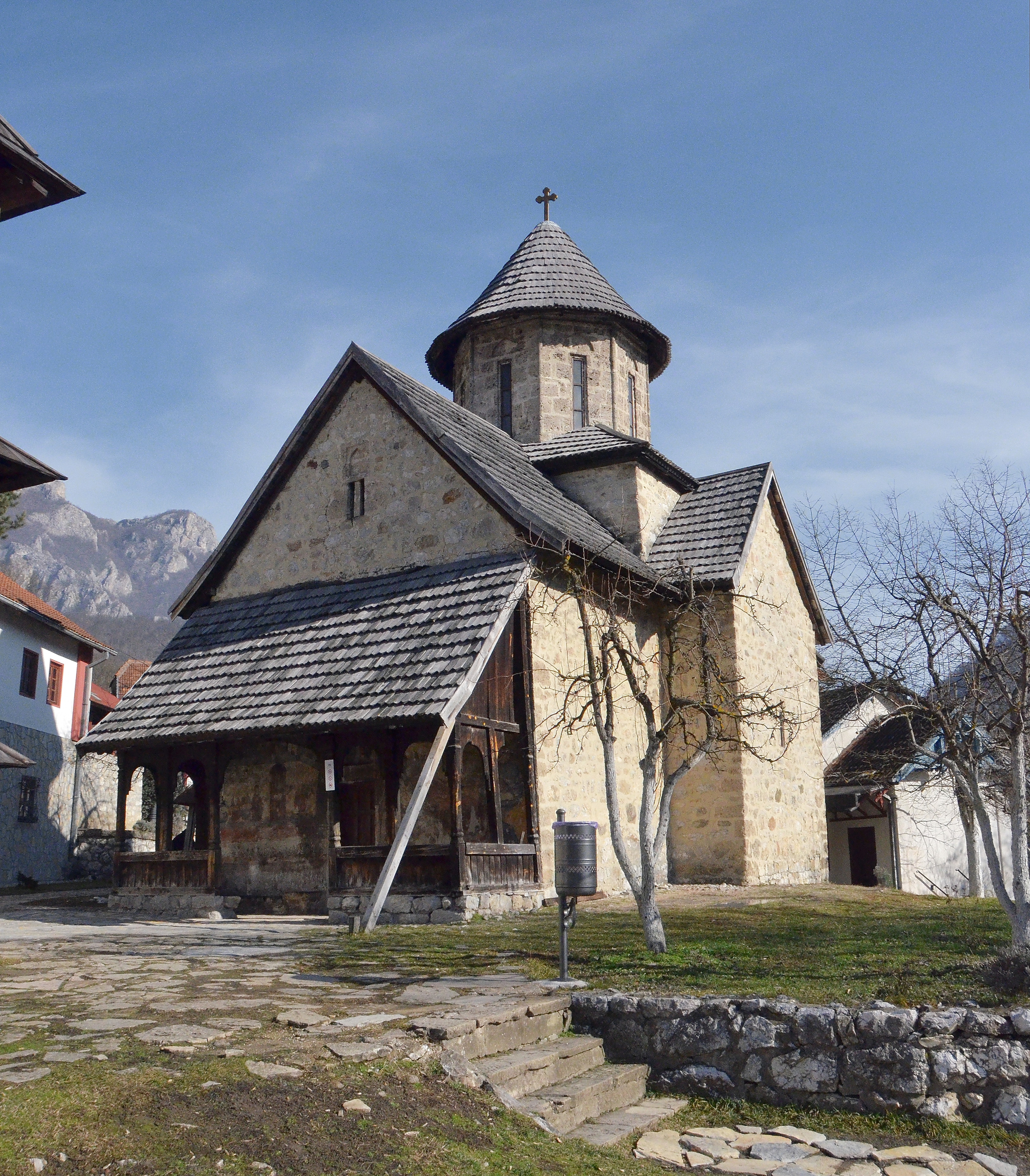 . Садашња црква подигнута је 1602. године, о чему сведочи натпис изнад улазних врата: „Изволенијем оца и поспешенијем сина и свршенијем Светог духа сазда се сиј свети и божествени храм Благовештеније пресвјатија владичице наше Богородице и присно дјеве Марије в времена тешка и нужна, трудом и усердијем игумана кир Никифора с братијами и сврши се в лето 7110 (године 1602)“.